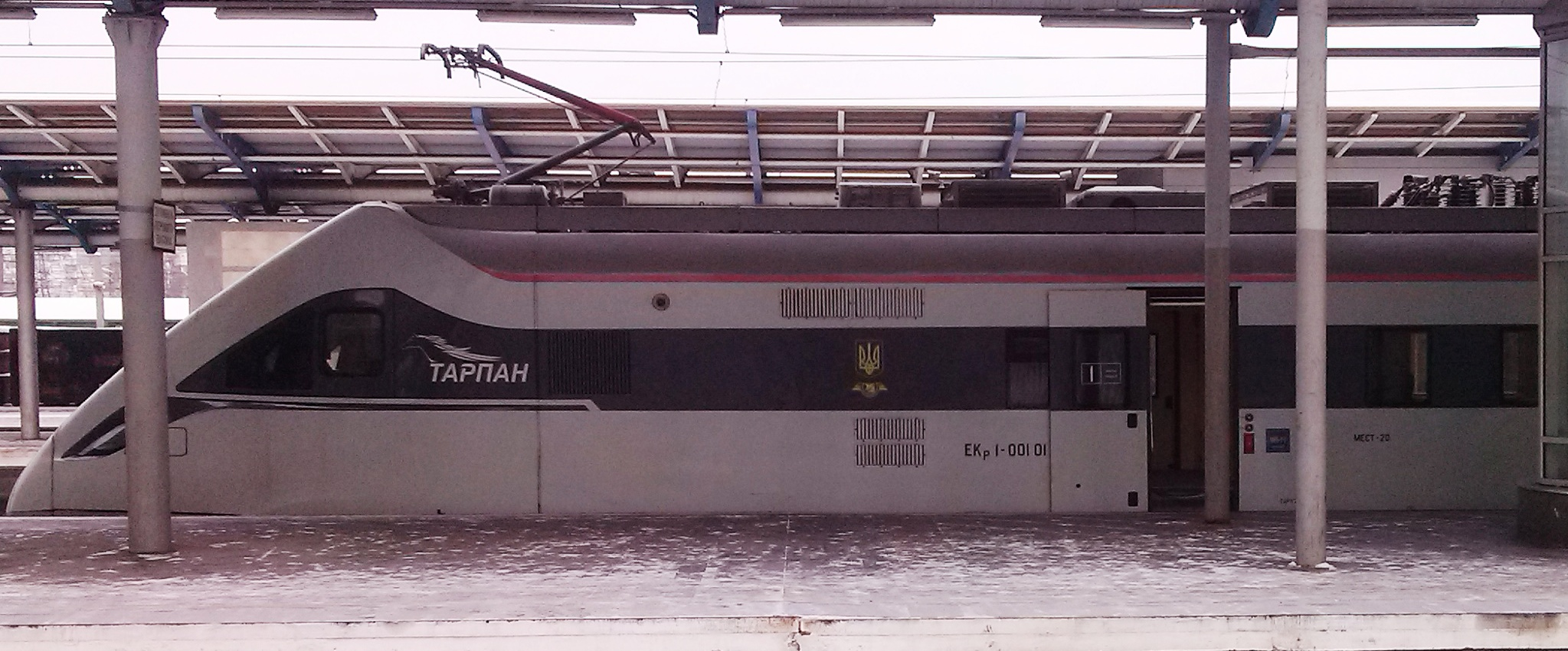 Экр1 "Тарпан"